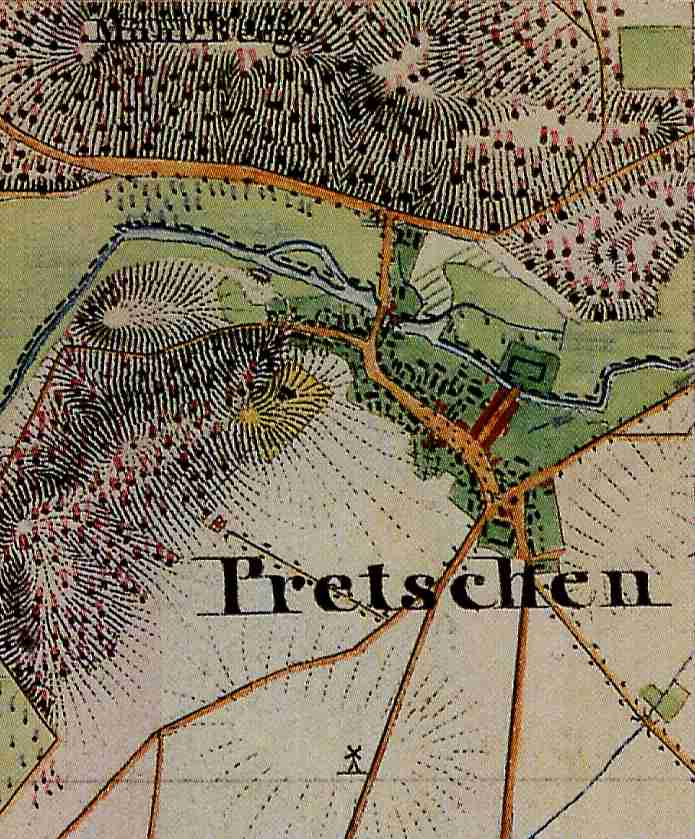 Pretschen, Ortsteil der Gemeinde Märkische Heide, Landkreis Dahme-Spreewald, Brandenburg, Deutschland, Ausschnitt aus dem Urmesstischblatt 3949 Schlepzig von 1846